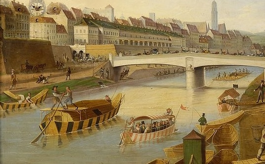 detail